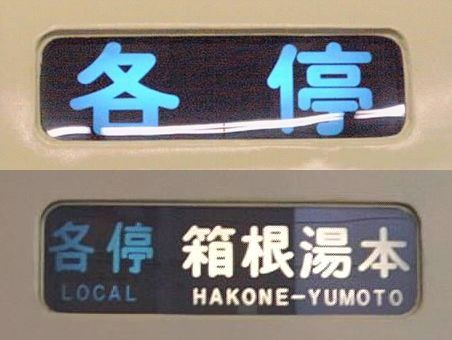 小田急の新旧側面種別幕。 上段が種別のみ表示の旧型（2600形） 下段が種別・行き先とも表示の新型（5200形）